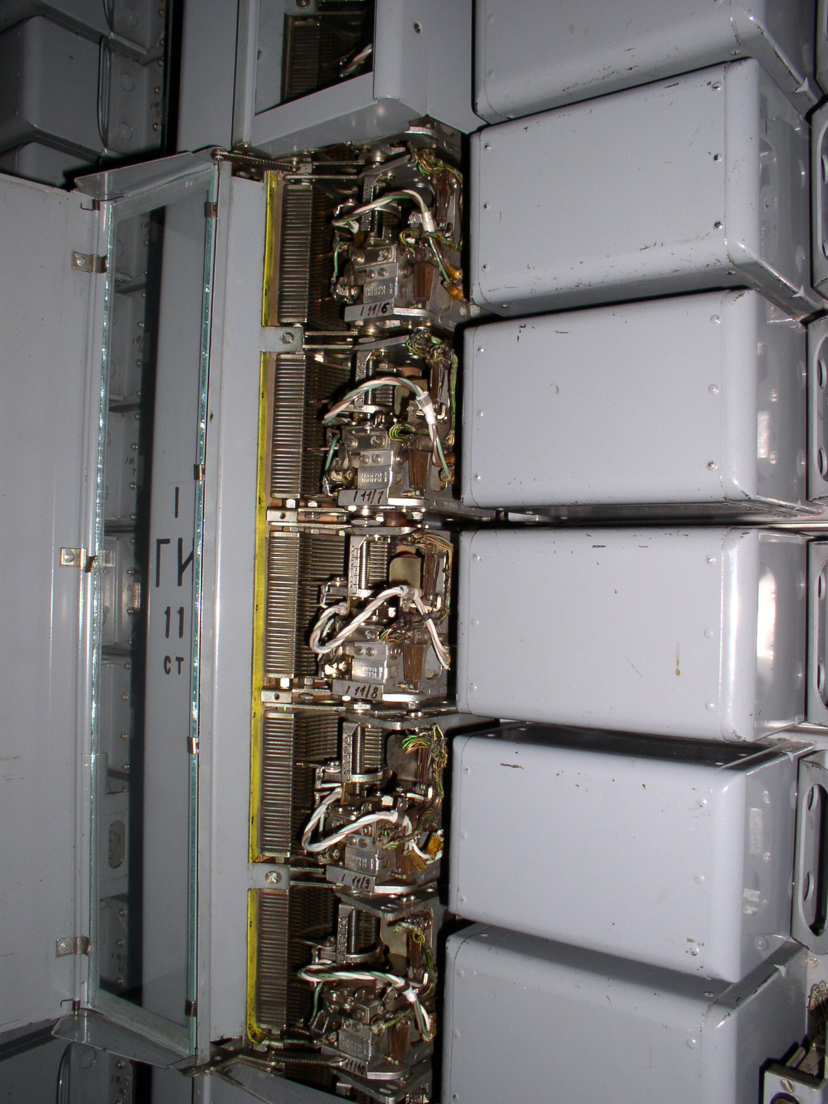 Часть статива группового искания (ГИ) на АТС-54 г. Запорожья